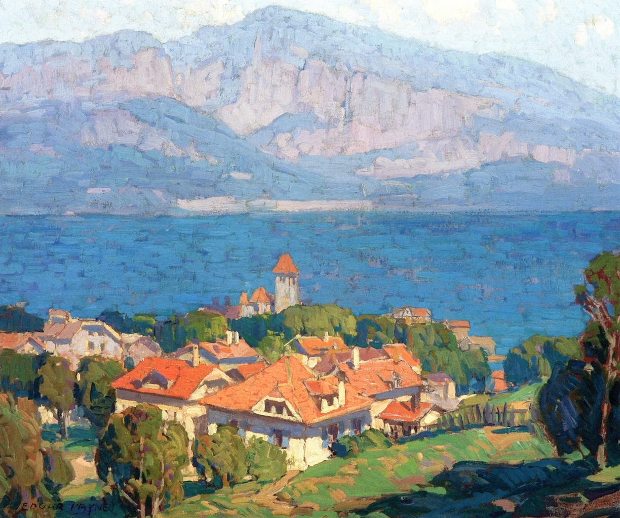 Картины Эдгара Пейна (англ. Edgar Alwin Payne; 1883—1947) — американского художника-импрессиониста